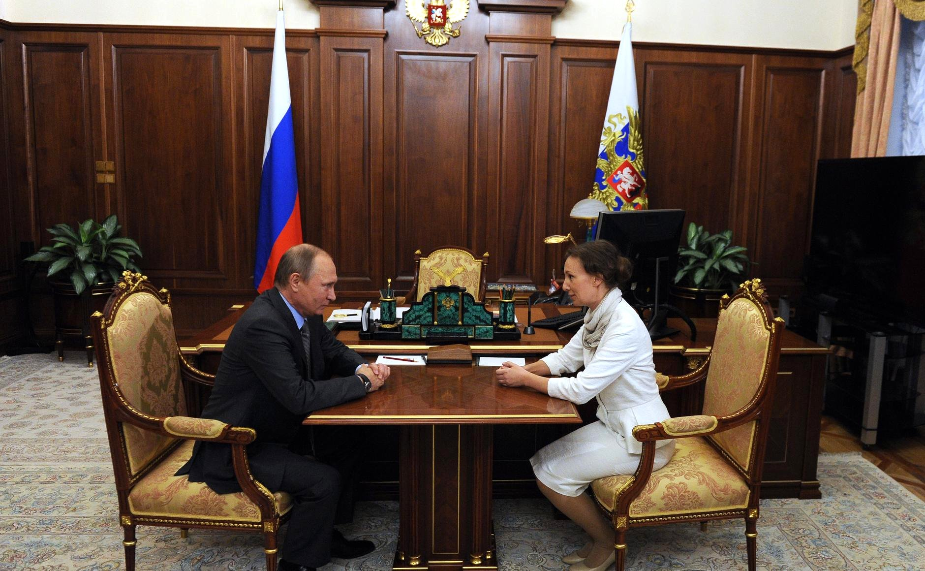 Встреча Президента России Владимира Путина с Анной Кузнецовой, назначенной Уполномоченным при Президенте по правам ребёнка.